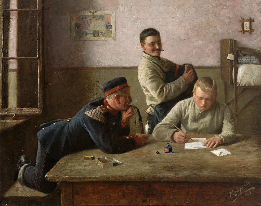 Drei Kameraden auf der Stube 52 x 67,5 cm.